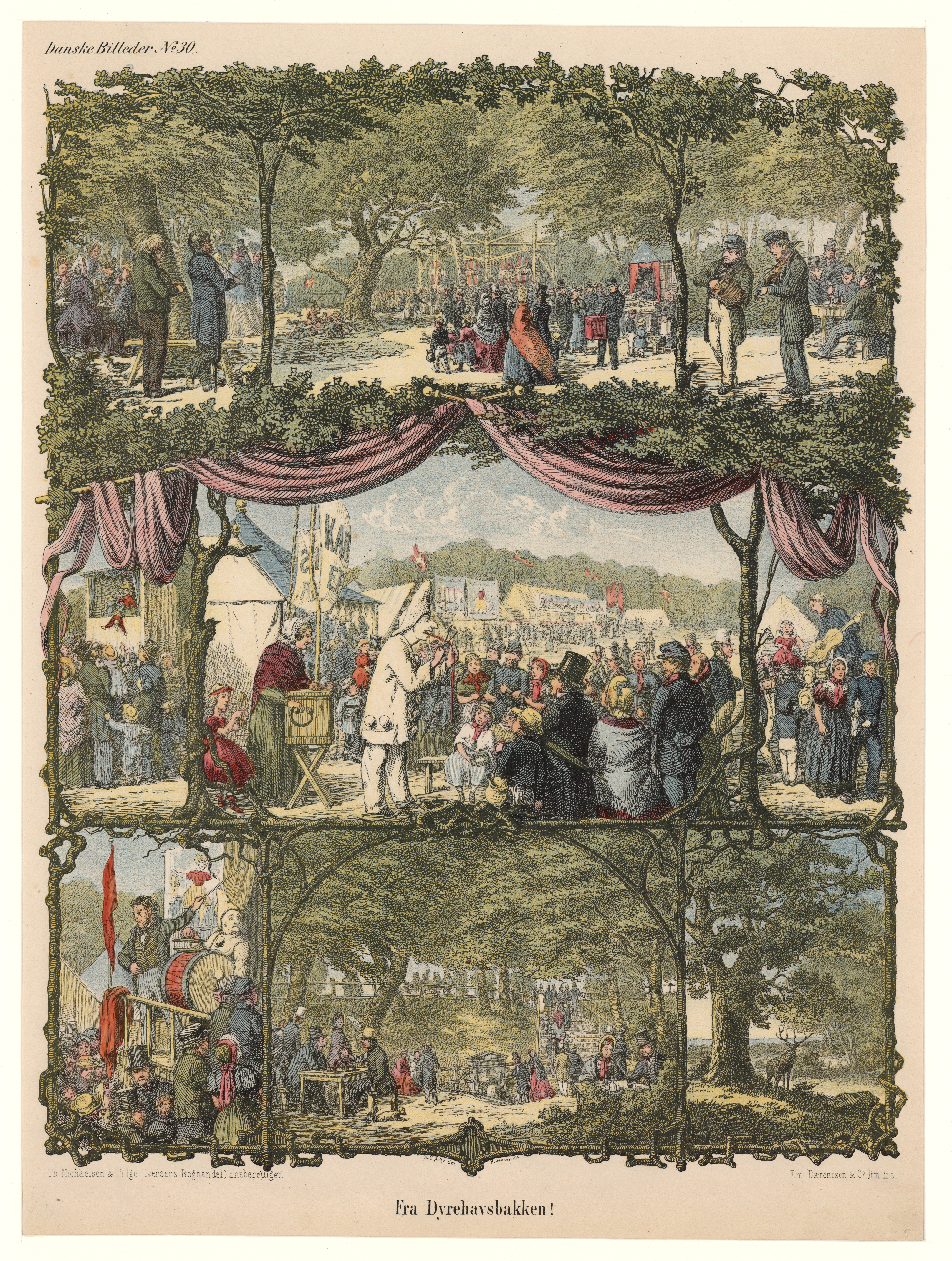 Nr. 30: Fra Dyrehavsbakken. Papir med farvelitografi. Øverst til venstre: Danske Billeder No. 30. Nederst til venstre: Th. Michaelsen & Tillge (Iversens Boghandel). Eneberettiget. Nederst midtfor: Fra Dyrehavsbakken. Nederst til højre: Em. Bærentzen & Co. lith. Inst.